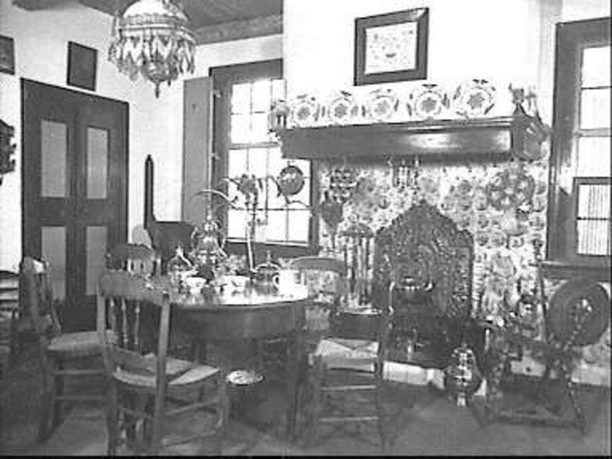 De Caterstee: interieur woongededeelte PBK NOM (opmerking: Deze afbeelding hebben wij helaas alleen in deze lage resolutie.) This is a possible Rijksmonument:Find the monument in the Monuments database:Kadoelen in KadoelenAll Rijksmonumenten in KadoelenIs this a Rijksmonument?YesNoMore information about this project and help. More images to work at in Category:Possible Rijksmonumenten.